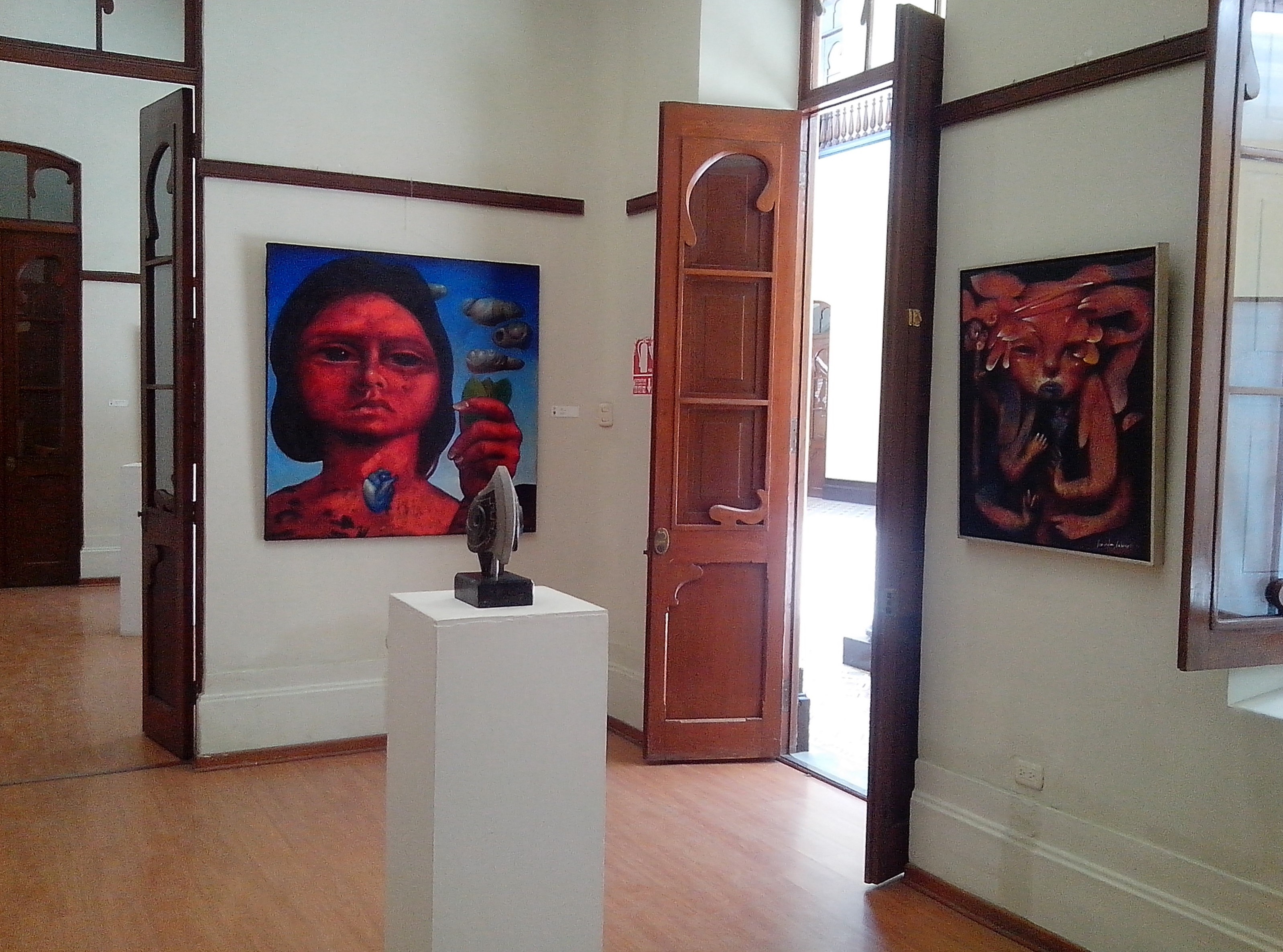 Interior del Palacio Municipal de Chiclayo